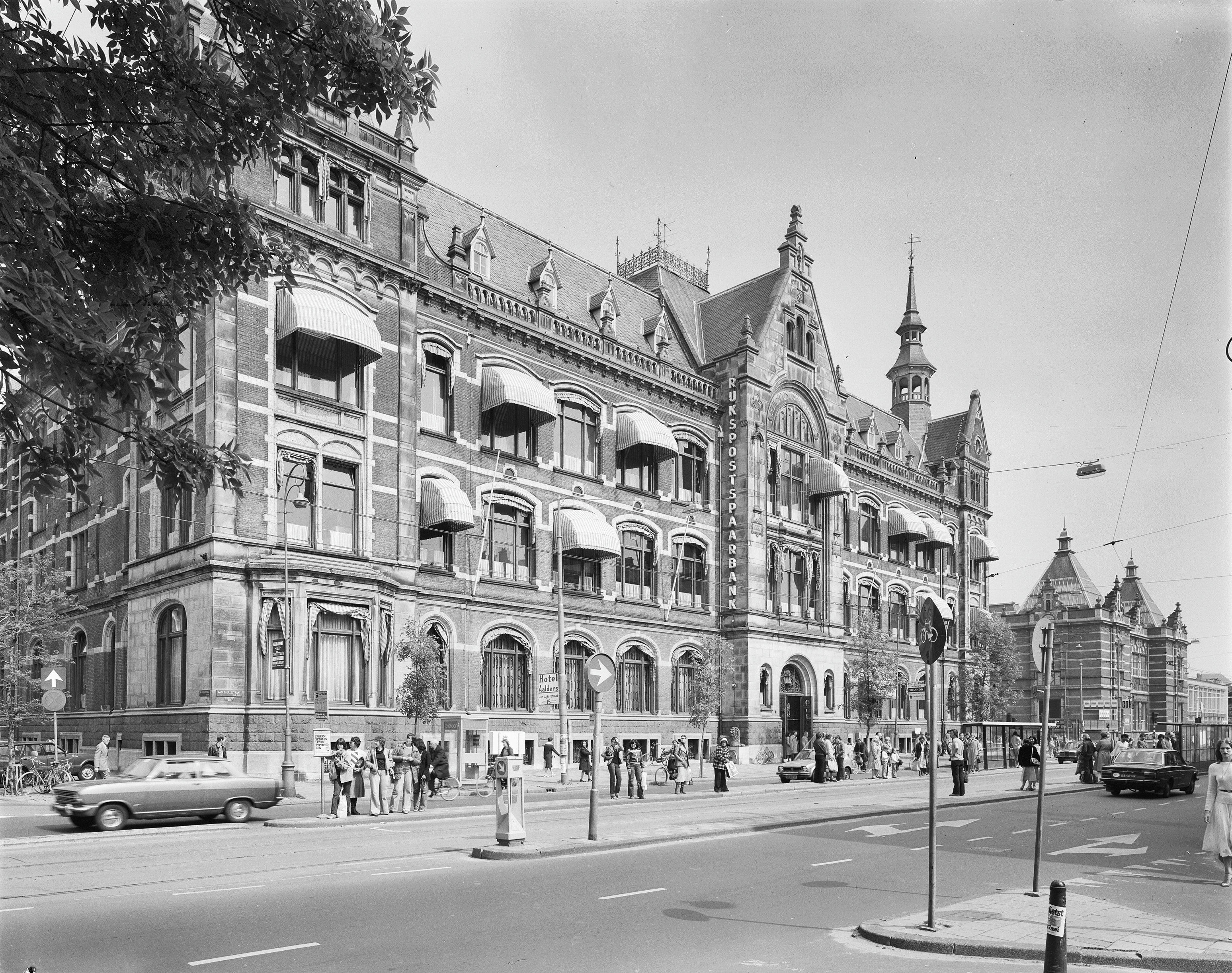 Rijkspostspaarbank: voorgevel